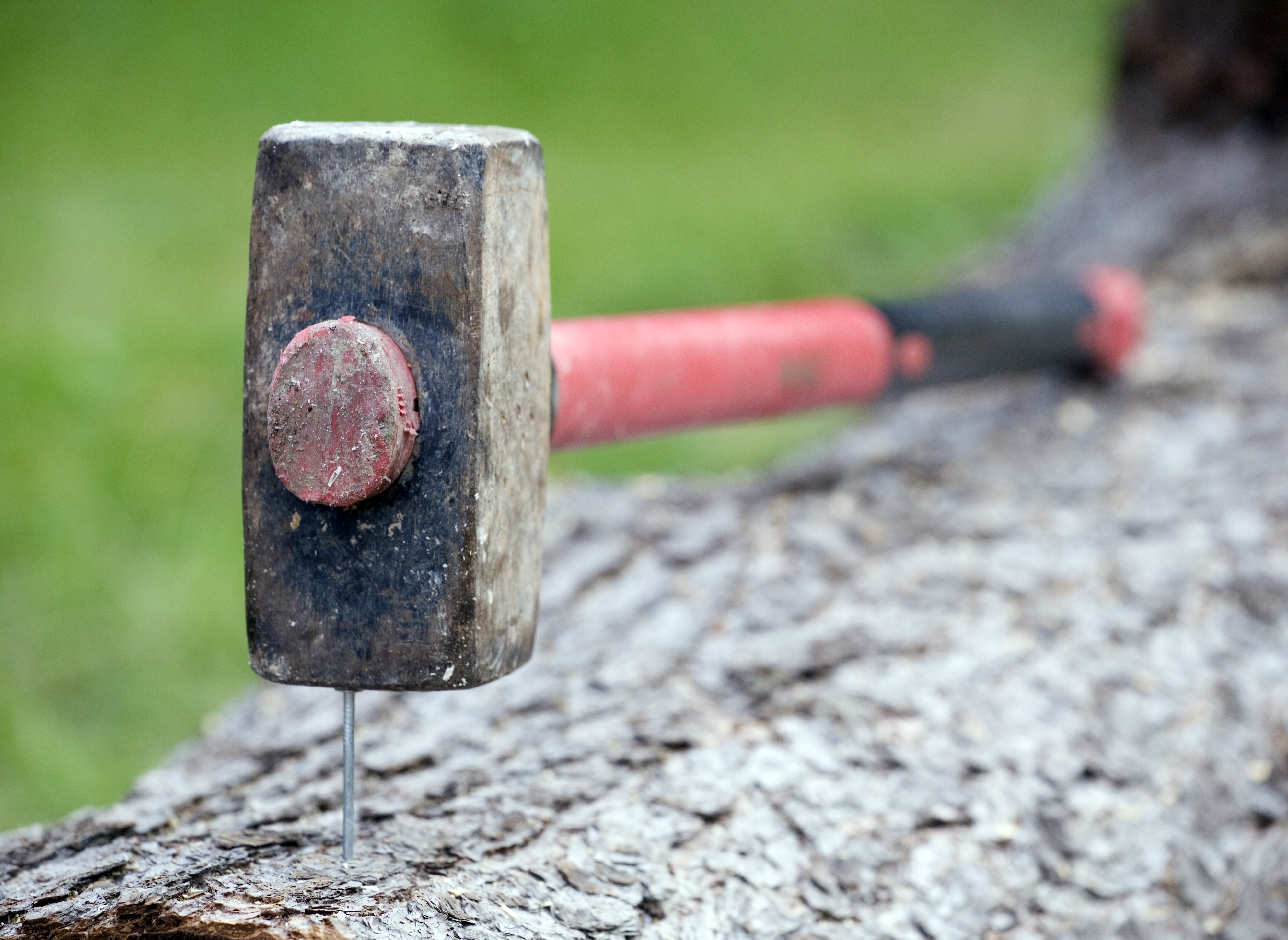 Мой банхаммер. Микрорайон «Заветы Ильича», город Пушкино Московской области